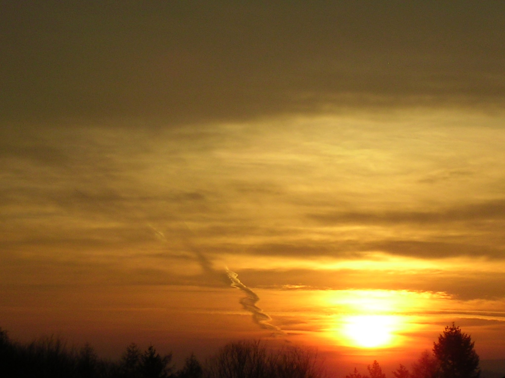 (en) Altostratus and sun rise (de) Rote Wolken beim Sonnenaufgang Aufnahmeort: Bearbeitung: keine